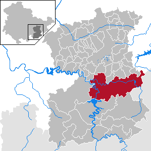 Schleiz in Thuringia - Saale-Orla-Kreis